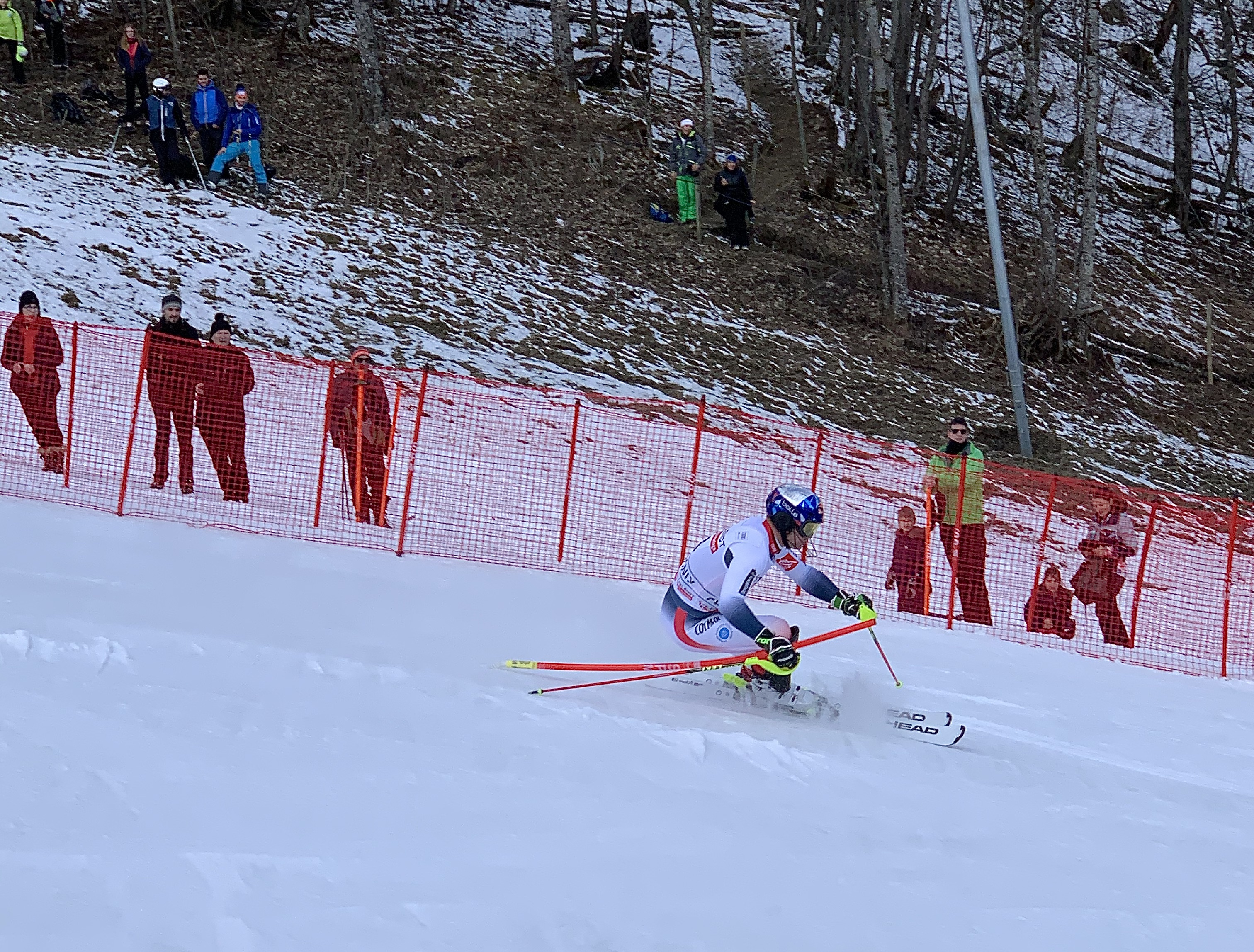 Alexis Pinturault dans la première manche du slalom de Chamonix sur la Verte des Houches le 8 février 2020